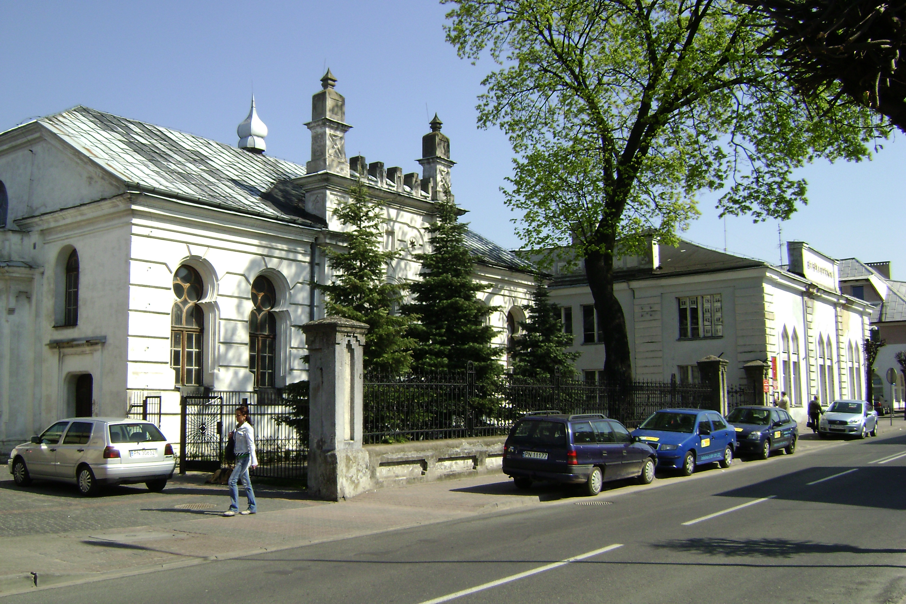 Synagoga i Żydowski "dom nauki"